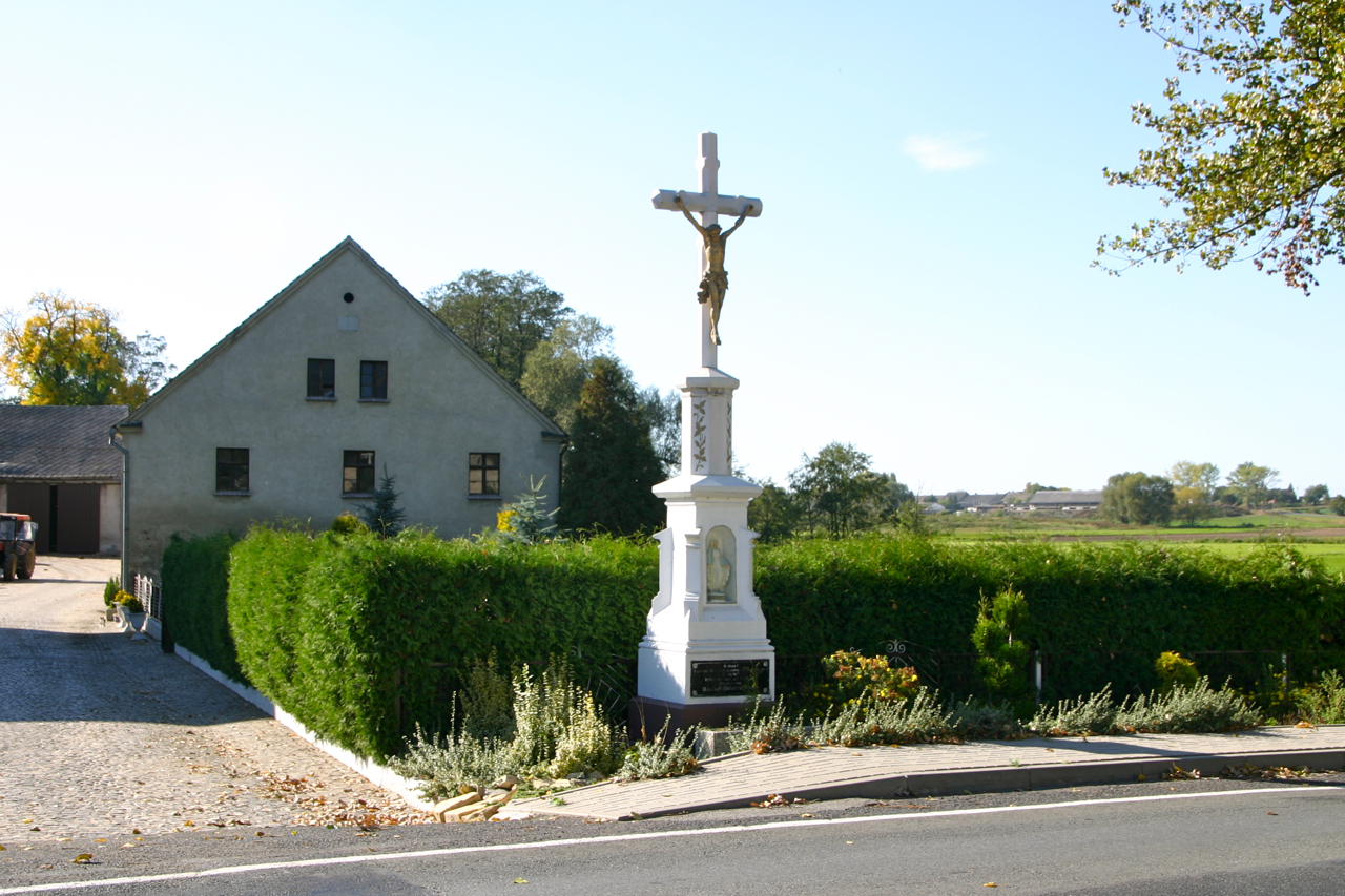 Zwiastowice (dodatkowa nazwa w j. niem. Schwesterwitz) – wieś w Polsce położona w województwie opolskim, w powiecie prudnickim, w gminie Głogówek.